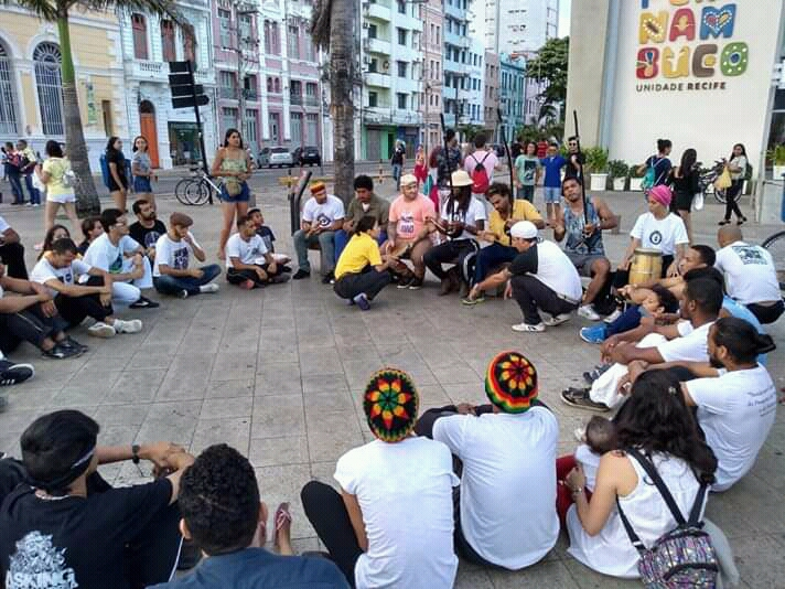 Patrimônio Imaterial da Humanidade